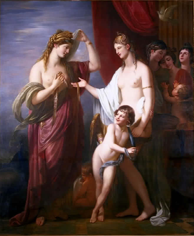 ? × ? cm